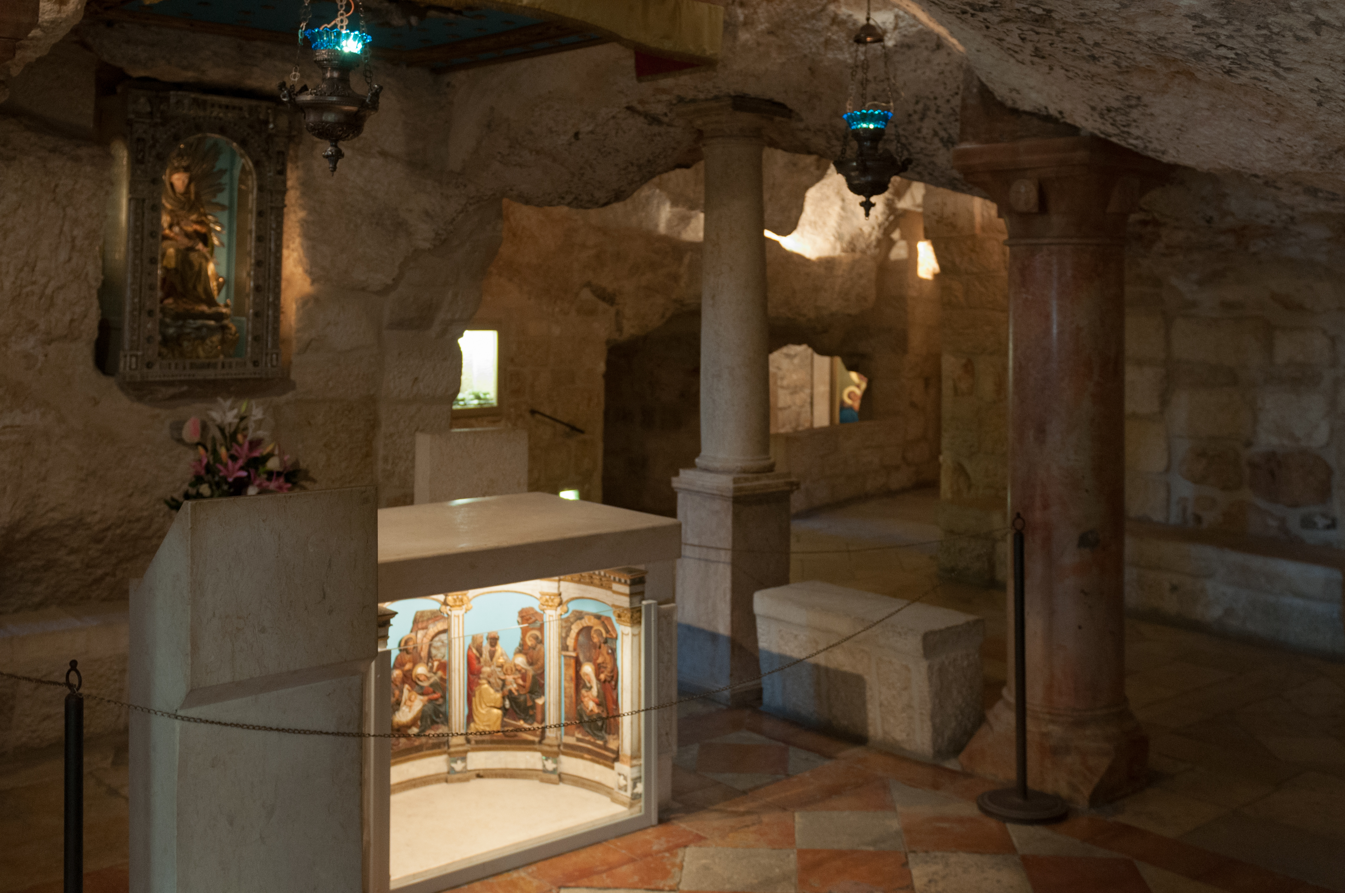 Milchgrotte in der Altstadt von Bethlehem, Palästina